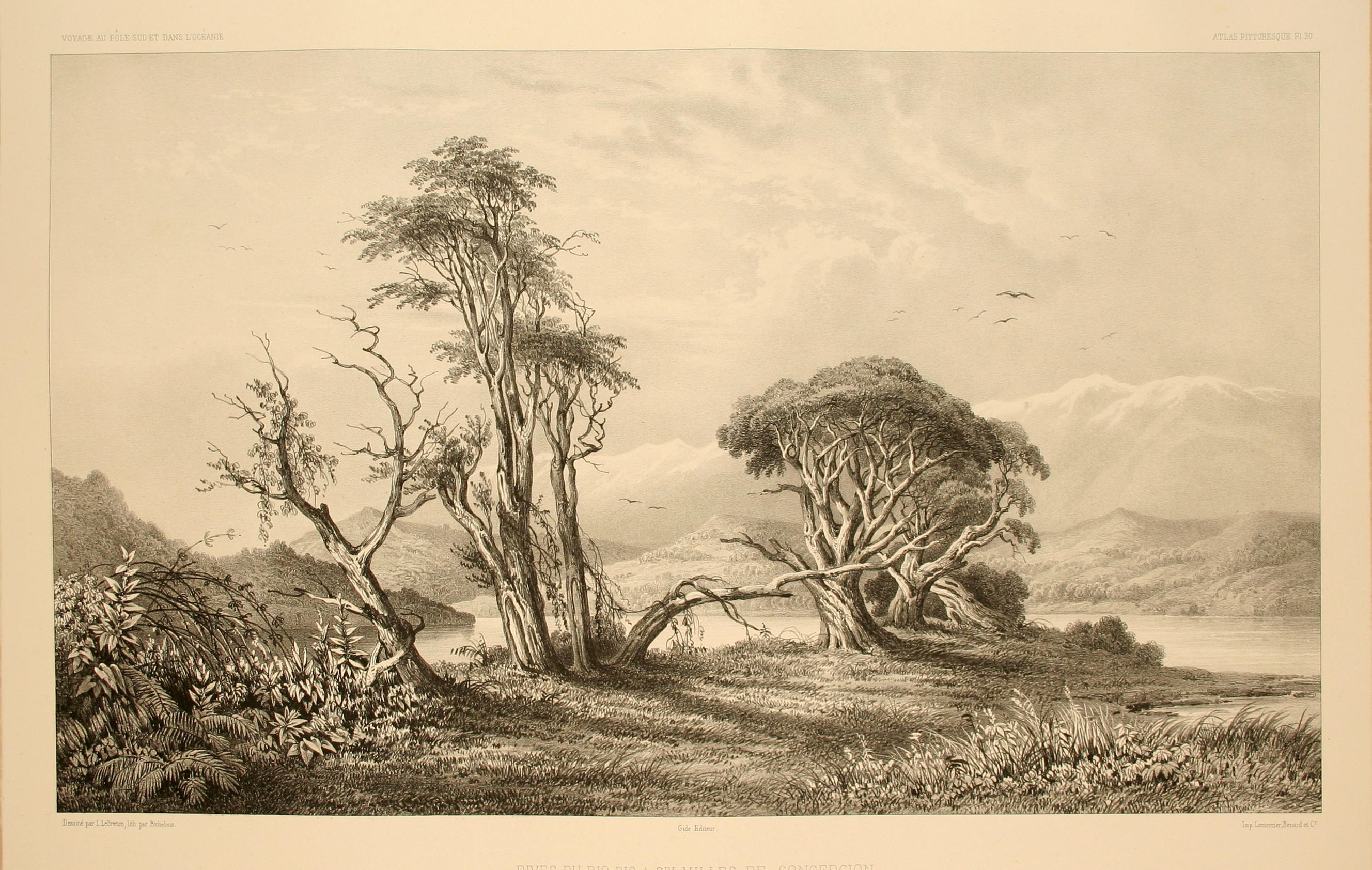 Rives du Bio-Bio à six milles de Conception. Atlas pittoresque, planche 30